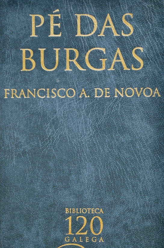 Detalle da portada dun volume de Pé das Burgas de Francisco A. de Nóvoa, da Biblioteca Galega 120.